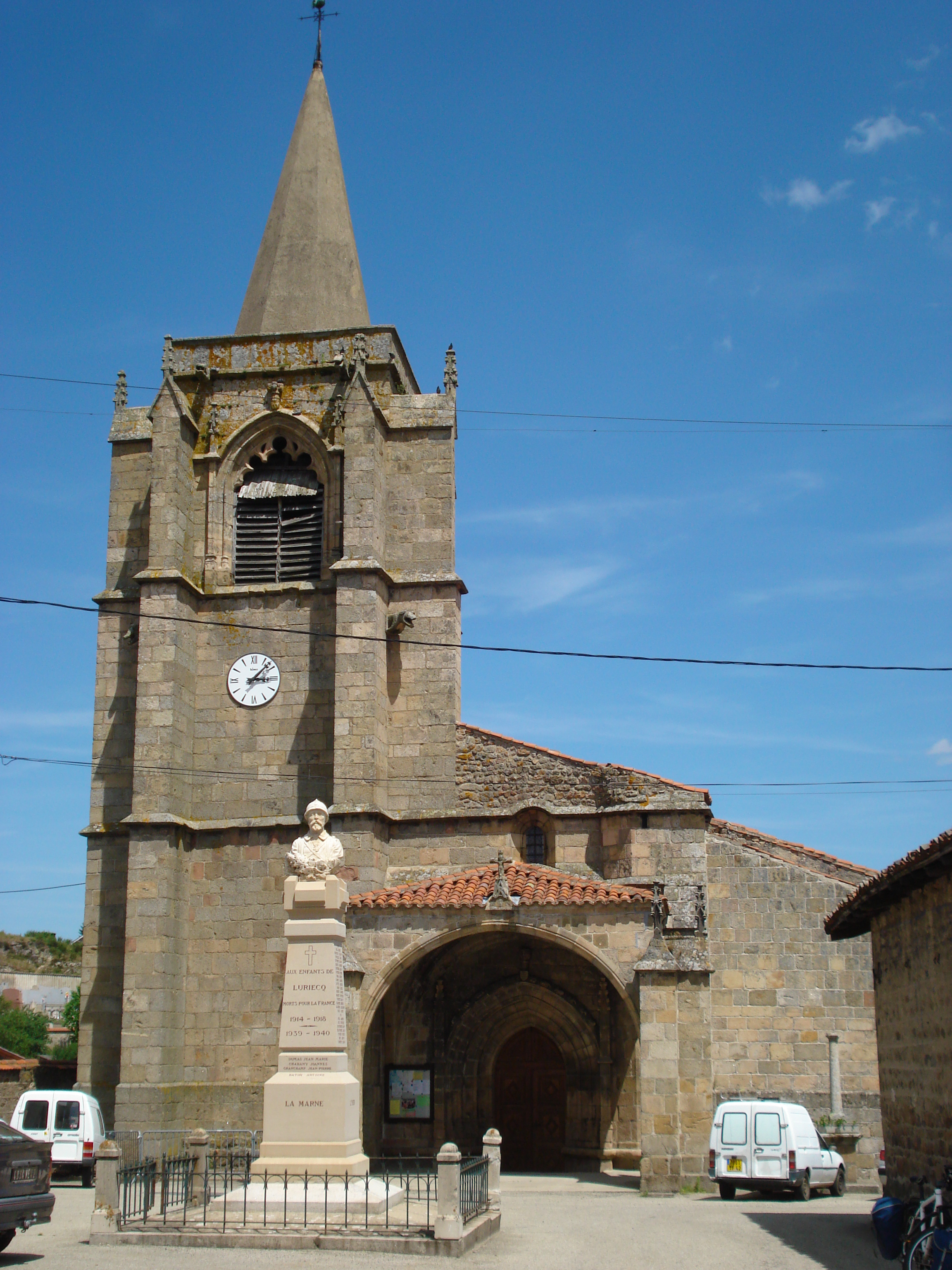 Luriecq (loire, Fr), l'église avec sa porche et le monument aux morts.